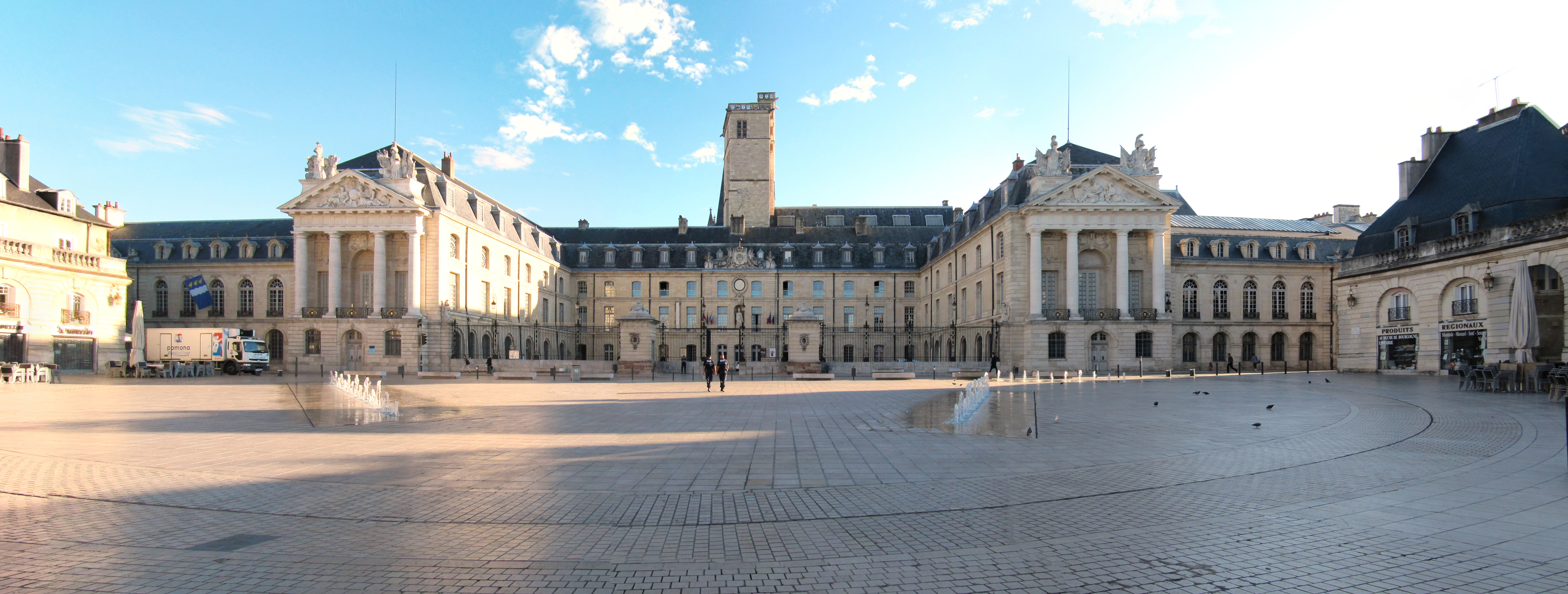 Vue du palais des ducs de Bourgogne (hôtel de ville) depuis la place de la libération